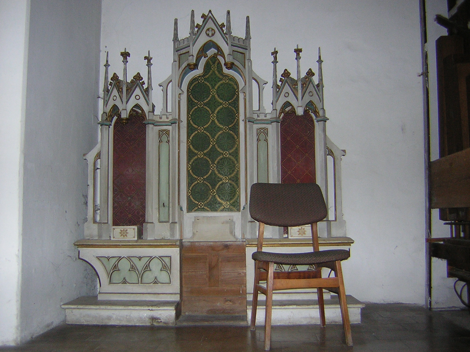 Stalla w Kościele Przemienienia Pańskiego w Iławie